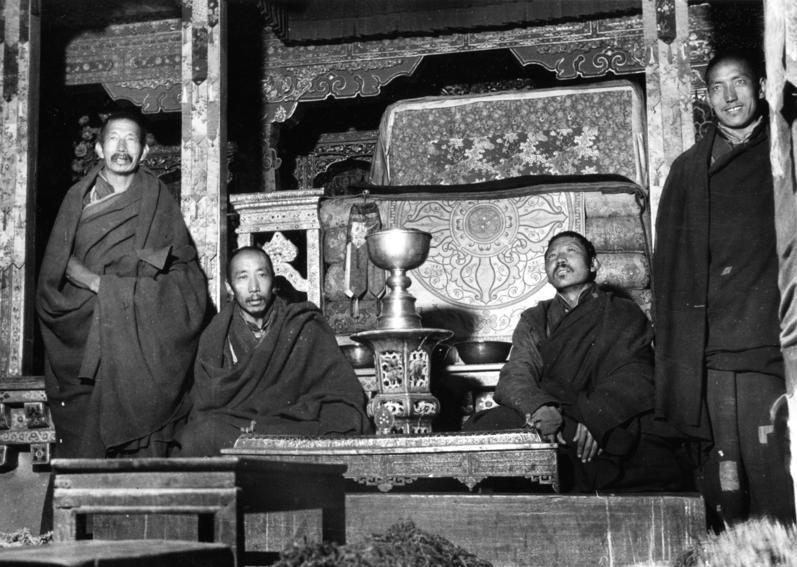 Lhasa, Norbulinkha, Lamas vor dem Thron des Dalai-Lama Information added by Wikimedia users.